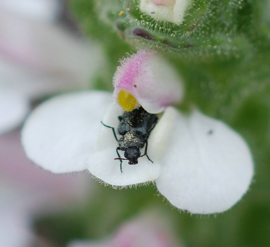 Bellardia trixago